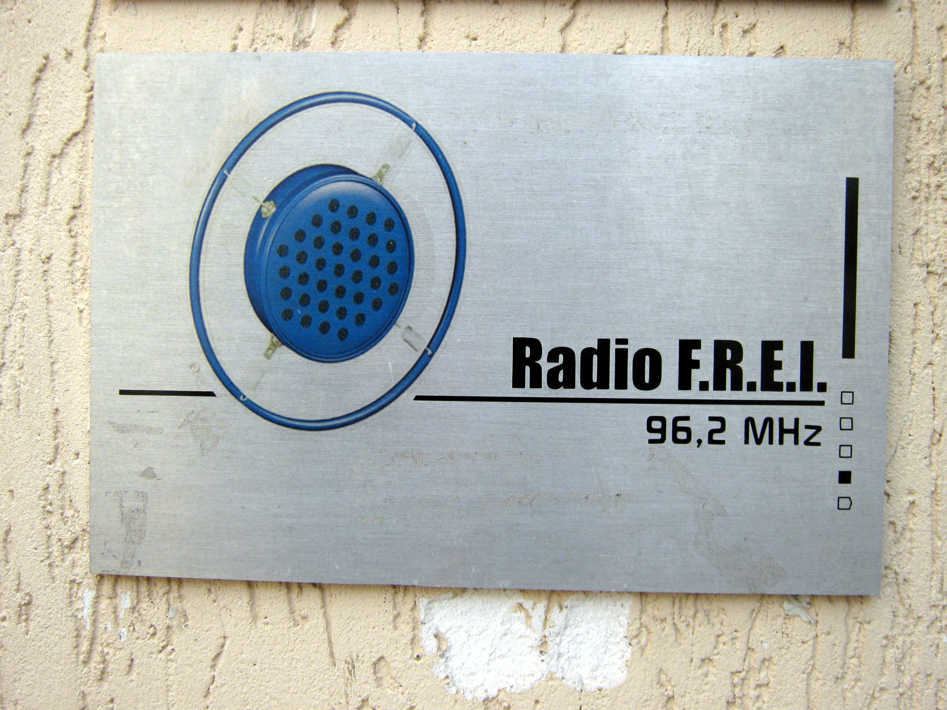 Türschild bei Radio F.R.E.I. Erfurt (Deutschland).